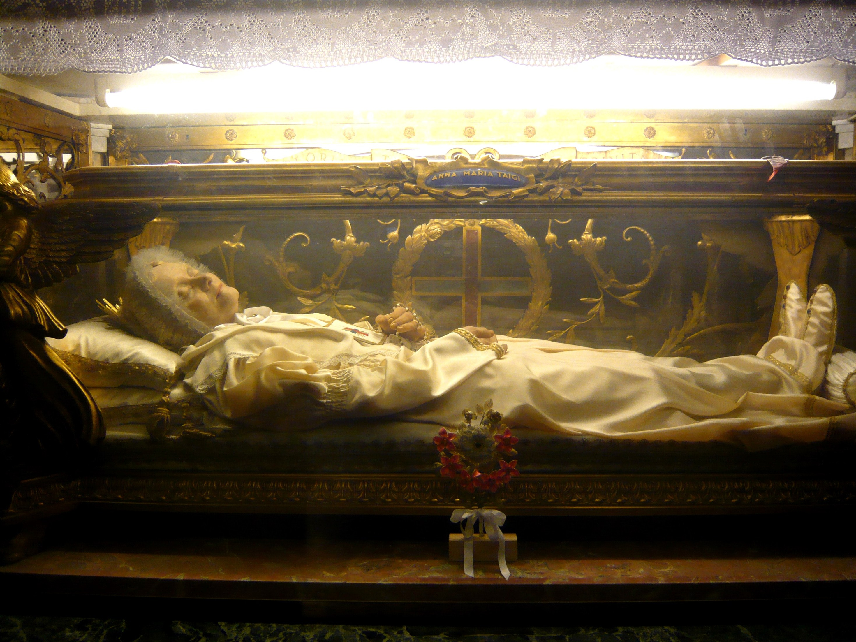 Sanctuaire de la Bienheureuse Anna Maria Taigi, Basilique Saint-Chrysogone, Rome